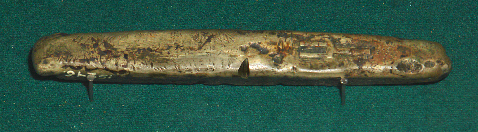 Древнерусская гривна. Вес 200,2 г. Центральный Военно-Морской музей, Санкт-Петербург.